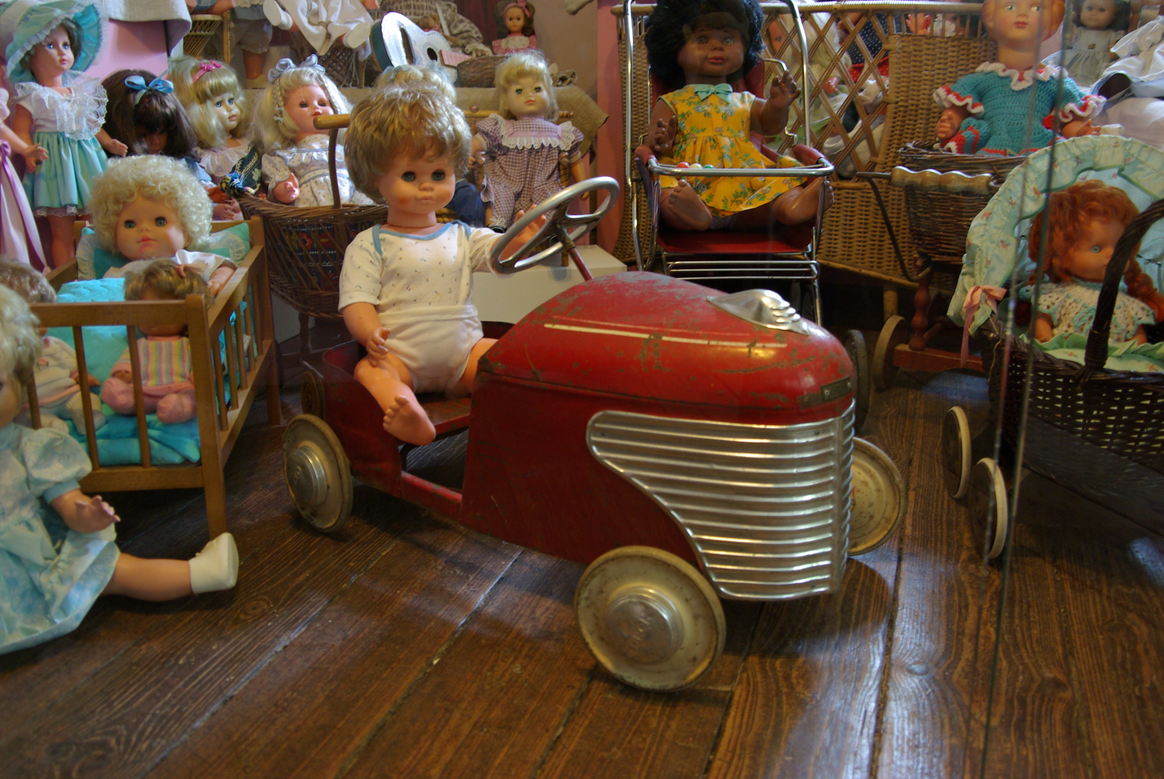 Volkskunde- und Freilichtmuseum Roscheider Hof, Puppensammlung im Hauptgebäude